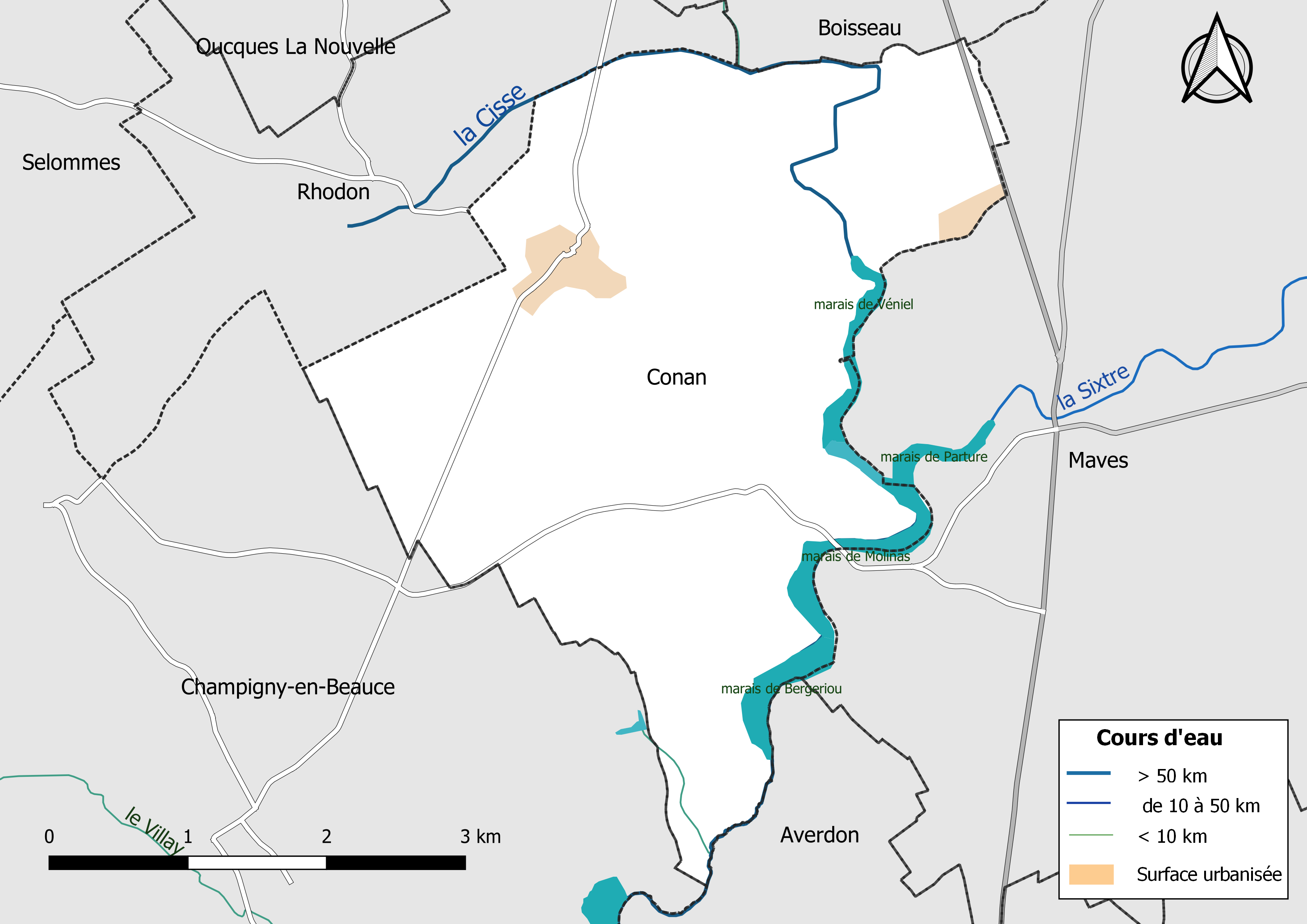 Carte du réseau hydrographique de la commune de Conan (Loir-et-Cher), France.